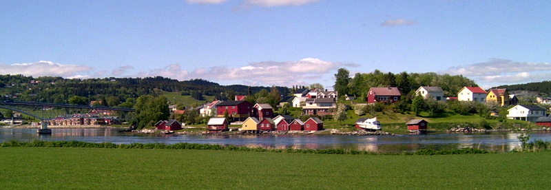 Del av kommunesenteret Straumen, Inderøy. I forgrunnen sundet mellom Borgenfjorden og Trondheimsfjorden, som har gitt tettstedet navn.